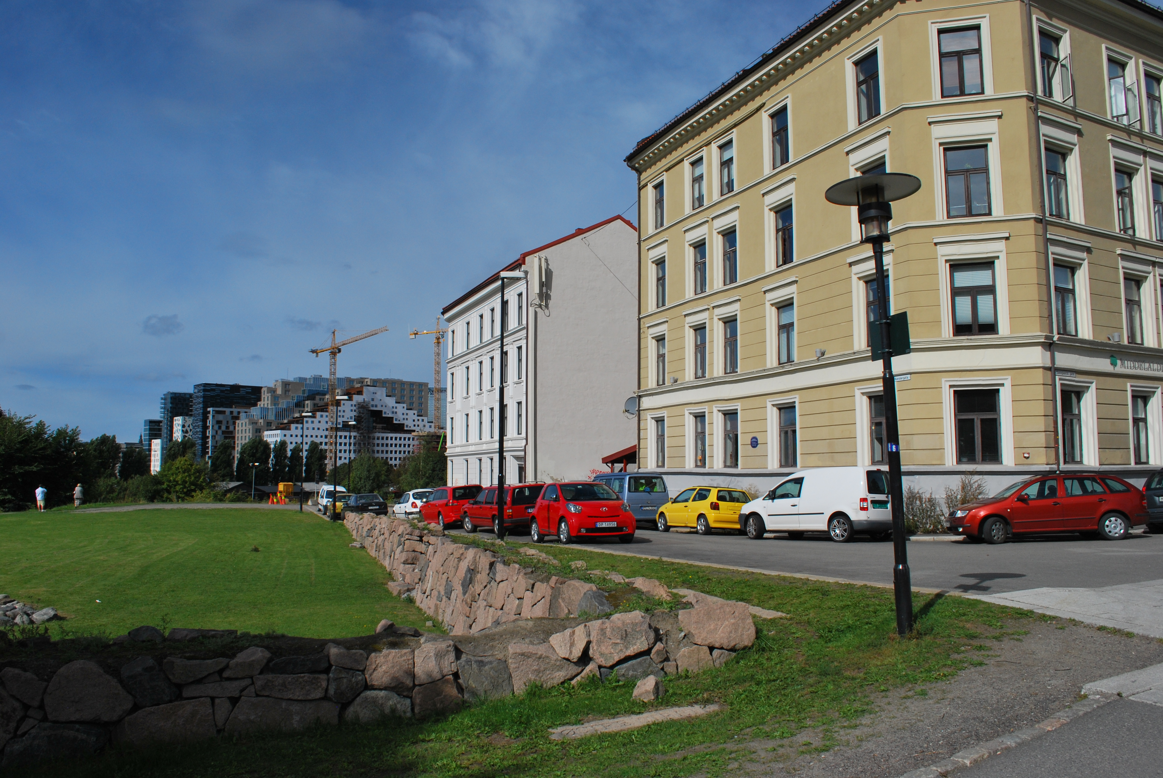 Kanslergata sett fra Erik Schias plass, Gamlebyen, Oslo. Barcode i bakgrunnen, grøntområdet der ruinen av Clemenskirken ligger til venstre.